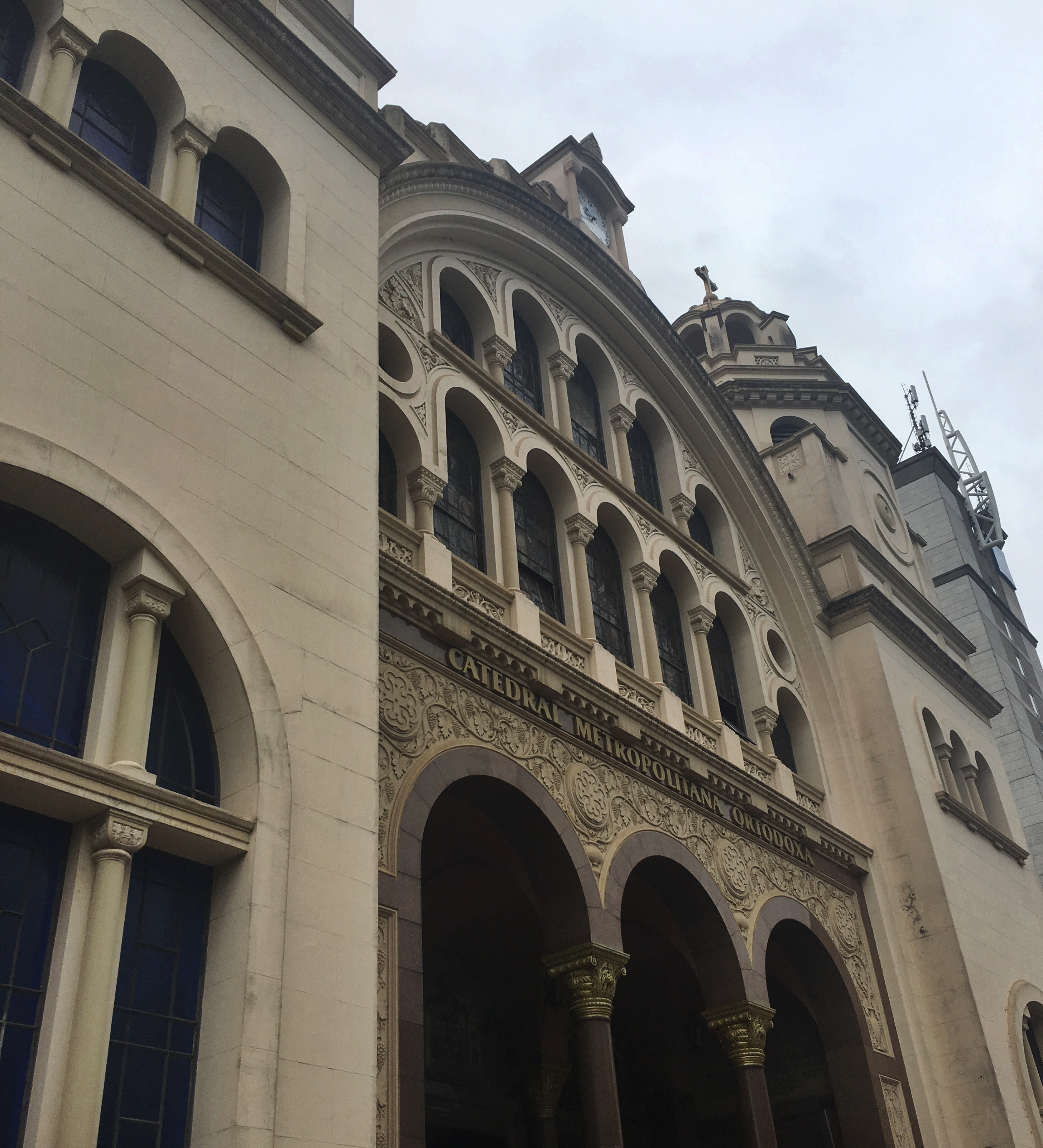 Detalhe parte superior da entrada